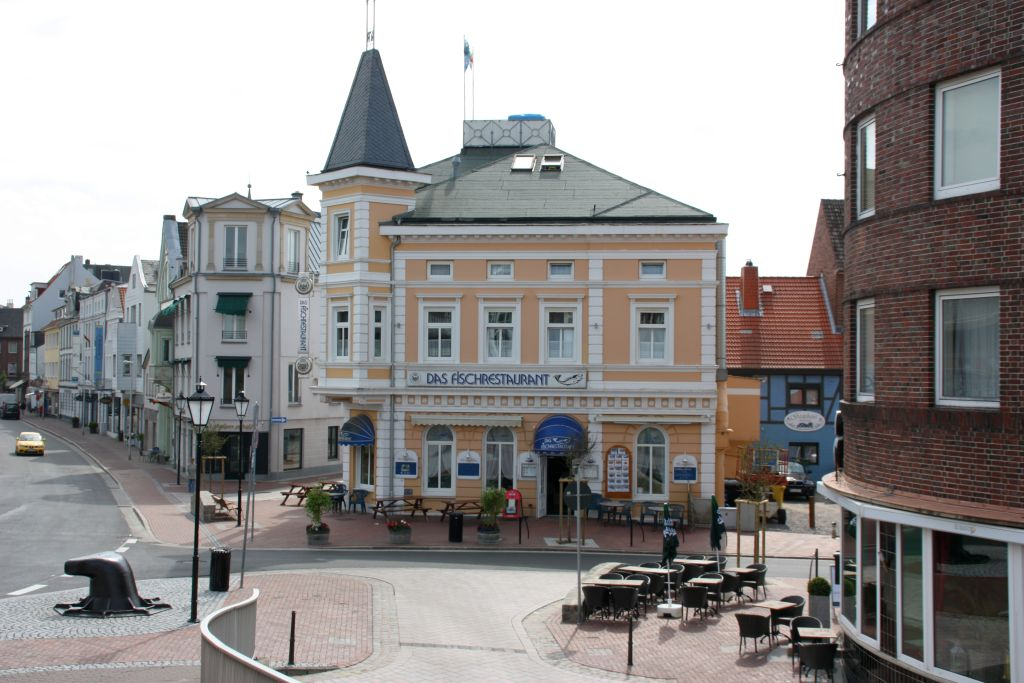 Das Fischrestaurant in Cuxhaven